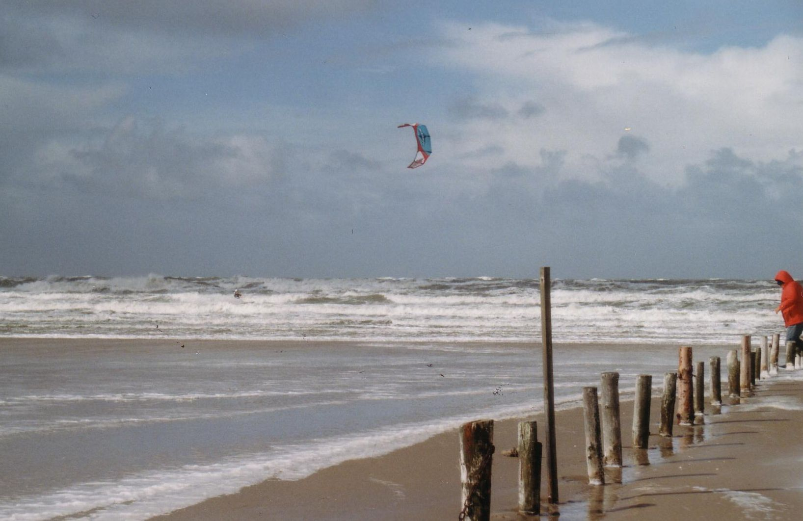 Fotografie vom Nordseestrand auf Römö, Kitesurfer im Sturm